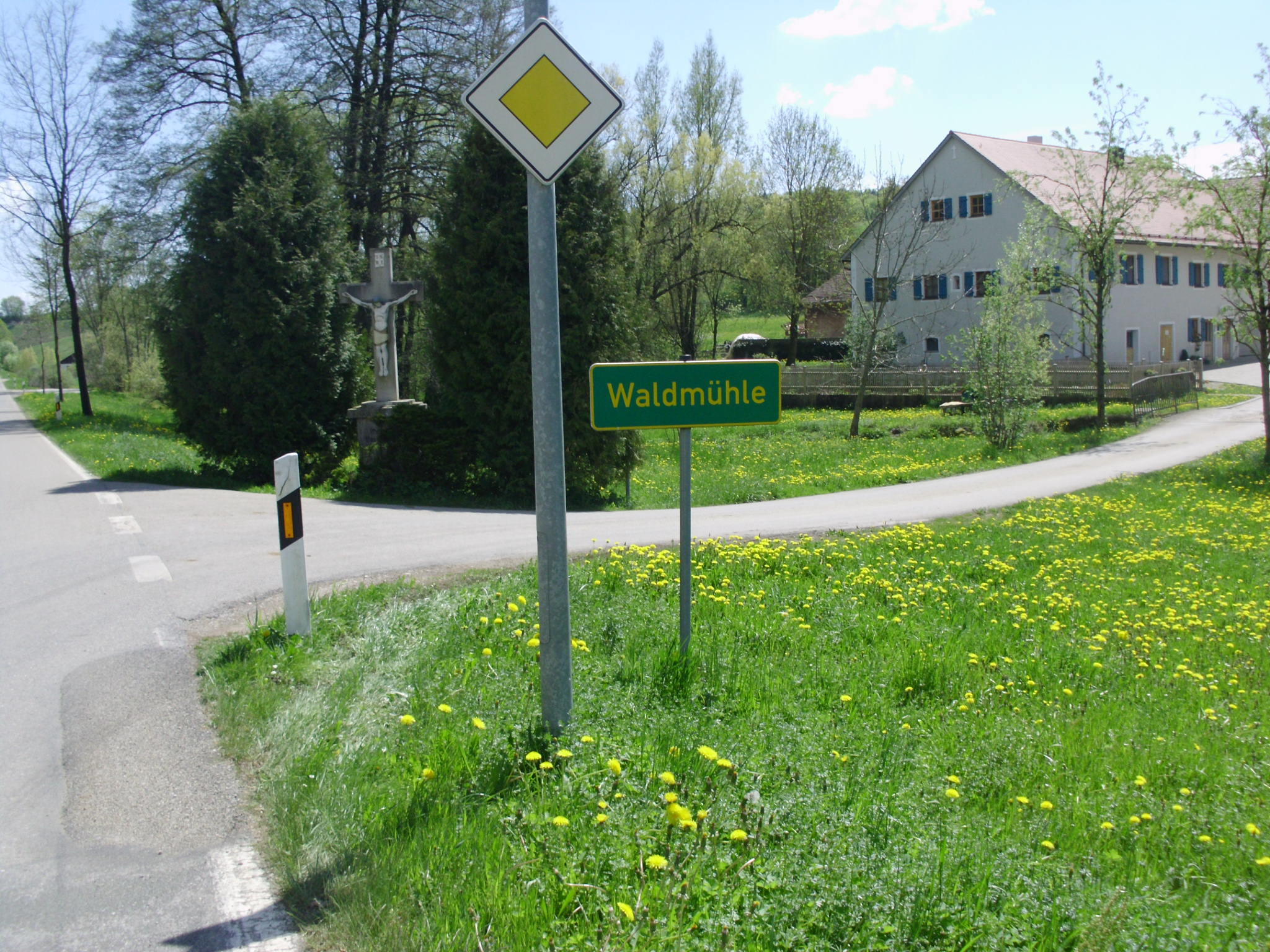 Gersdorf, Ortsteil des Marktes Nennslingen im Landkreis Weißenburg-Gunzenhausen, Bayern, Ortsteil Waldmühle